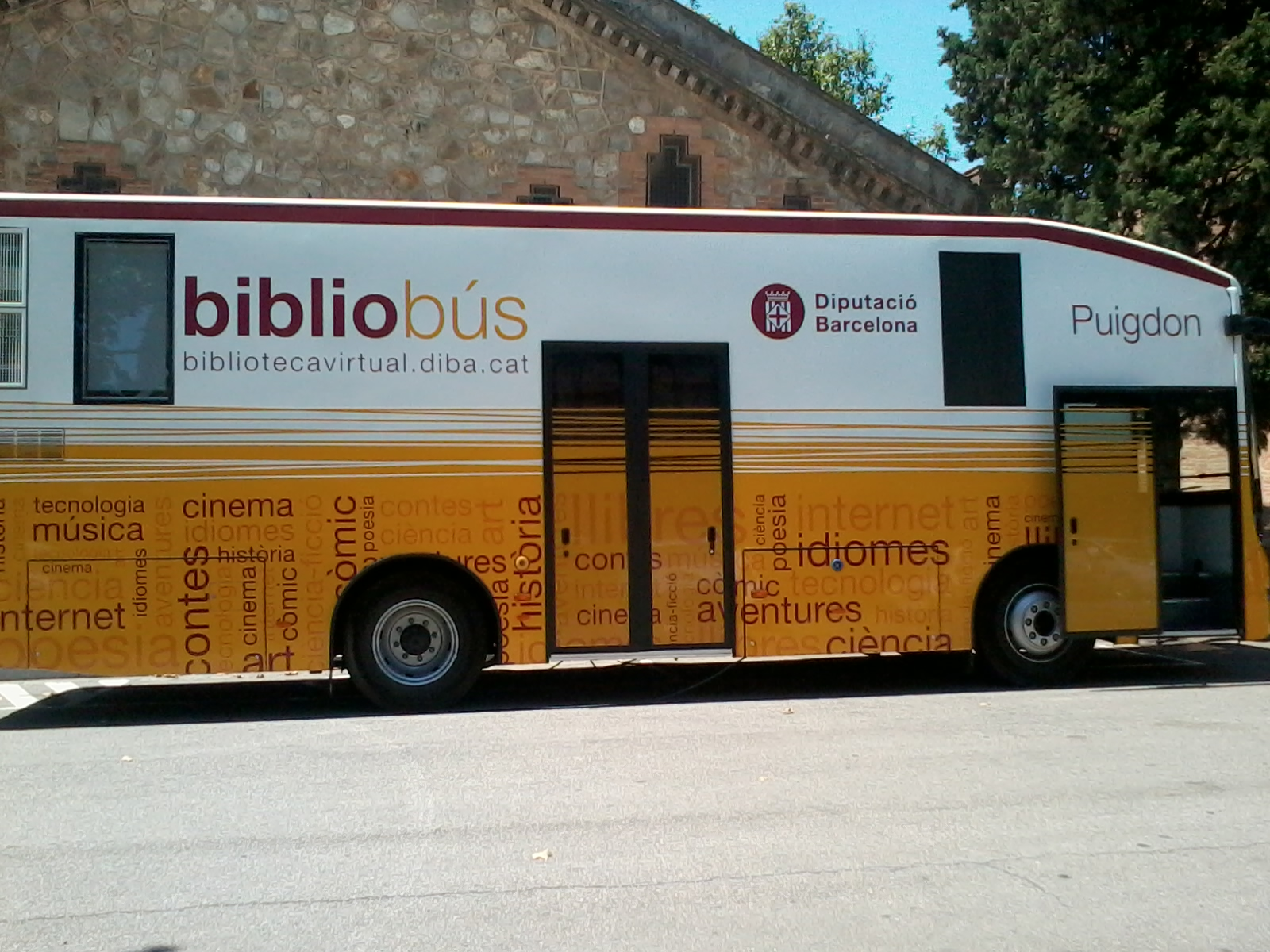 Bibliobús Puigdon al Recinte de l'Escola Industrial (Barcelona)